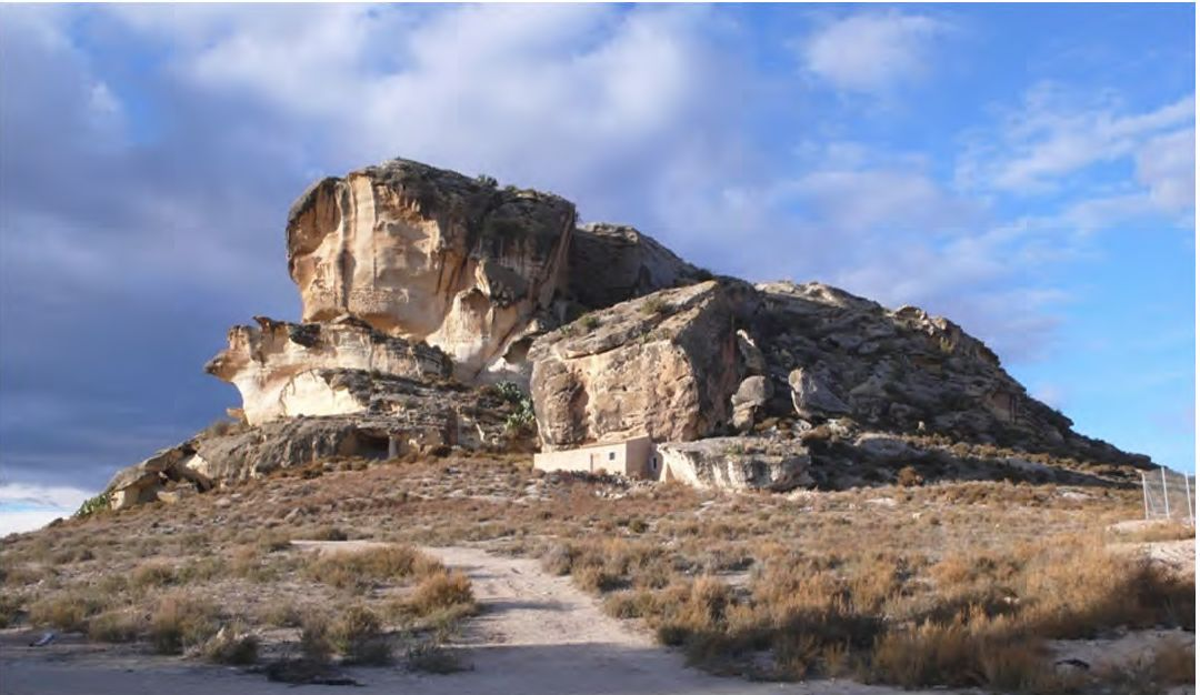 El Tolmo de Minateda visto desde el sureste